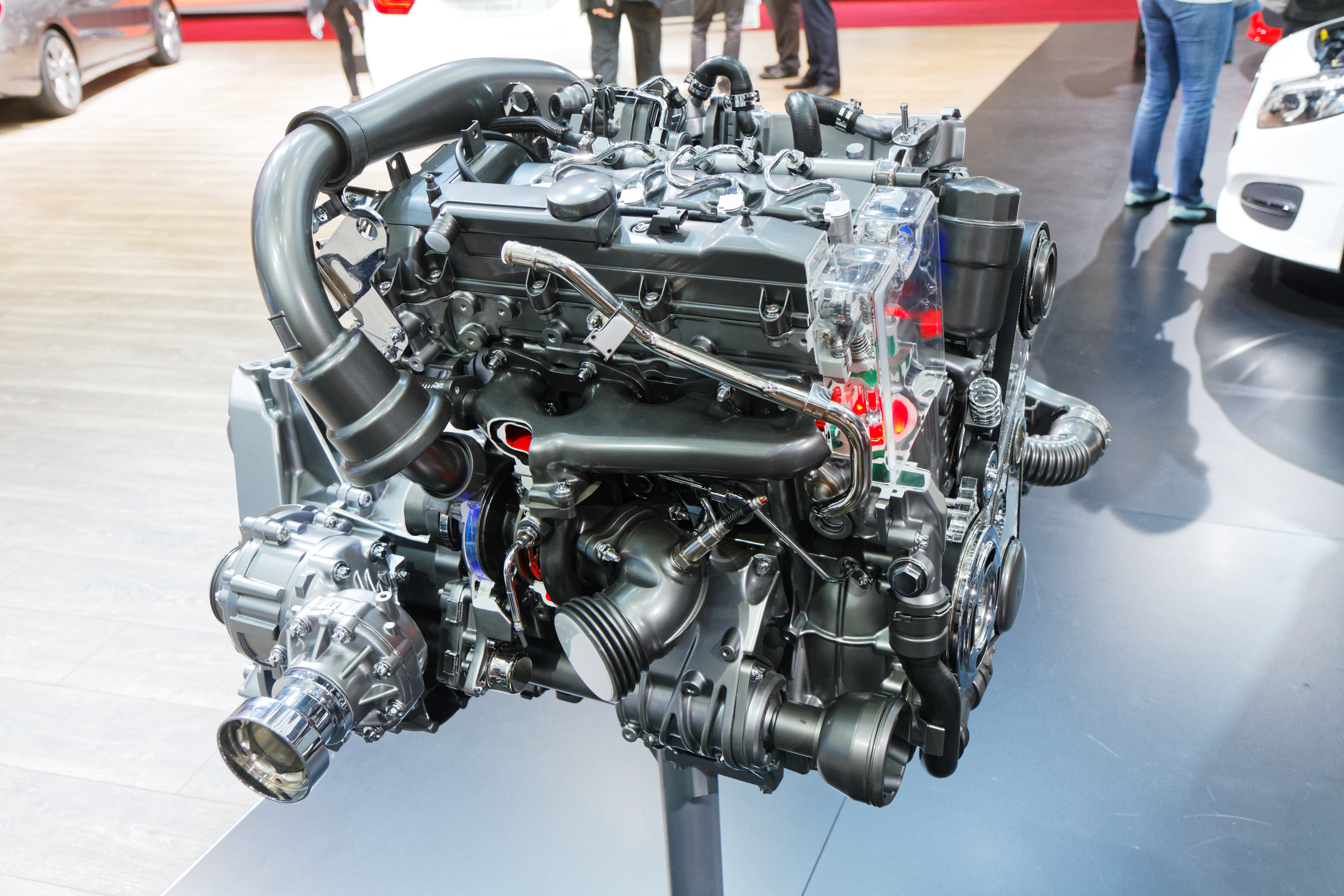 Un moteur Mercedes OM651 MFA présenté lors du mondial de l'automobile de Paris 2014.